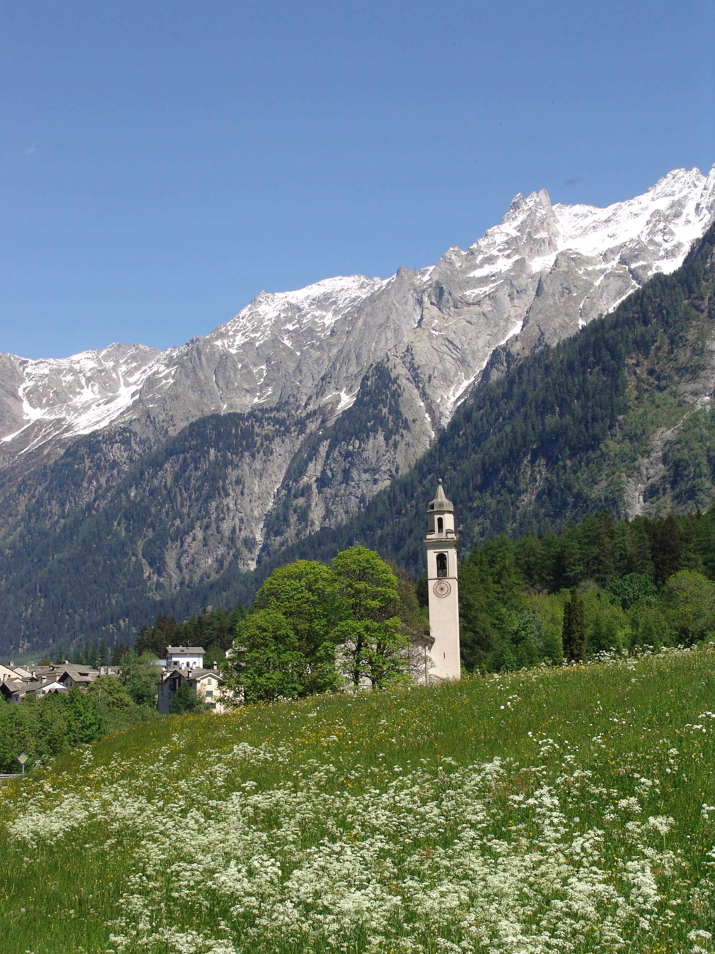 Reformed church S. Giorgio, Borgonovo, Val Bregaglia